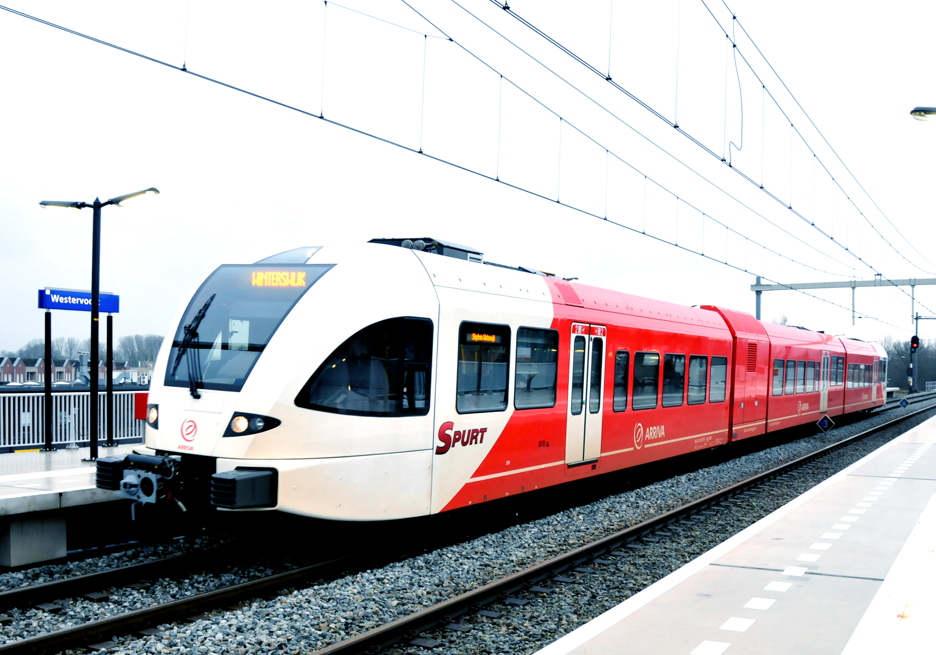 Arriva treinstel 10.370 van het type Stadler Rail type GTW te Westervoort. Bij Arriva worden deze treinstellen Spurt genoemd.